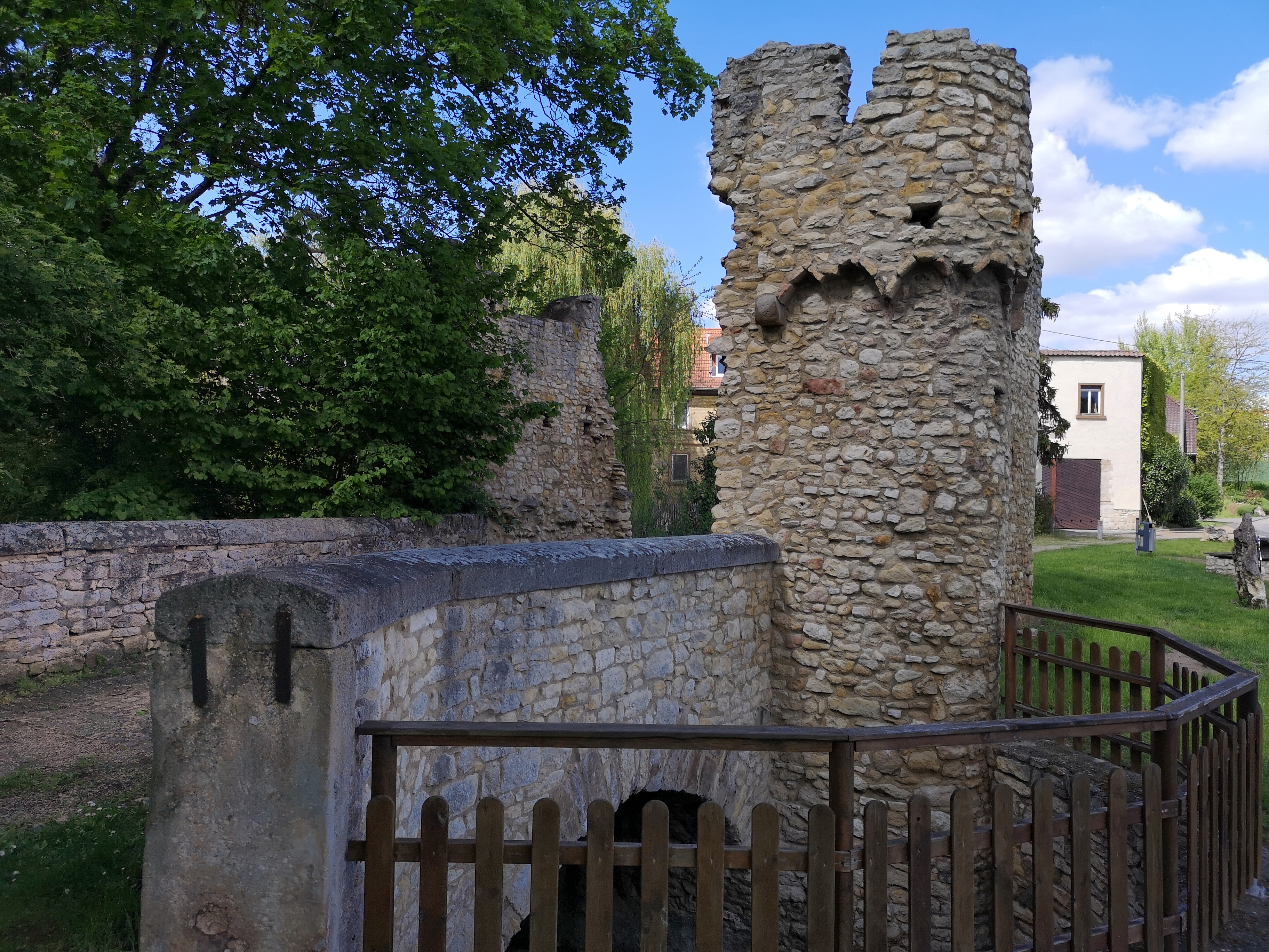 Die Ruine einer alten Zollstelle aus dem 14. Jahrhundert am Übergang über die Selz am Ortsrand von Elsheim wird legendenhalber mit der Wallfahrt der Hl. Ursula von Köln mit ihrer Entourage (11.000 Jungfrauen) in Verbindung gebracht.